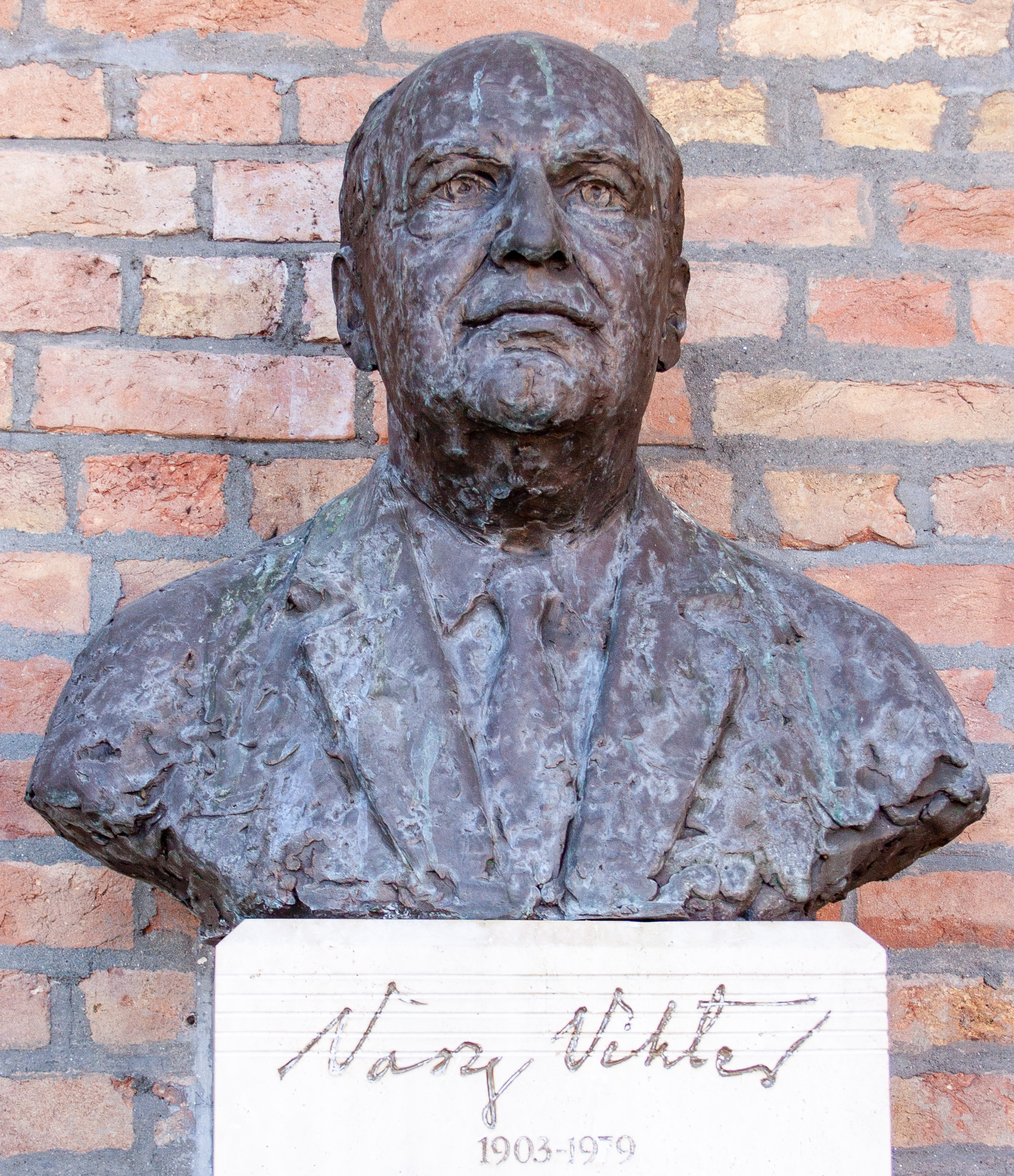 Vaszy Viktor. Fritz Mihály alkotása photo by uploader